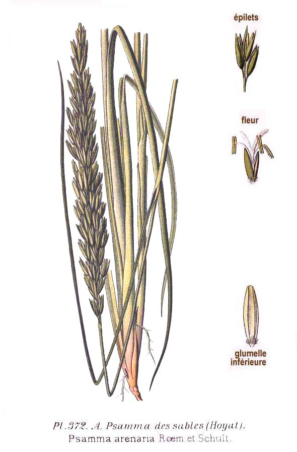 Ammophila arenaria subsp. arenaria, syn. Psamma arenaria Roem et Schult.